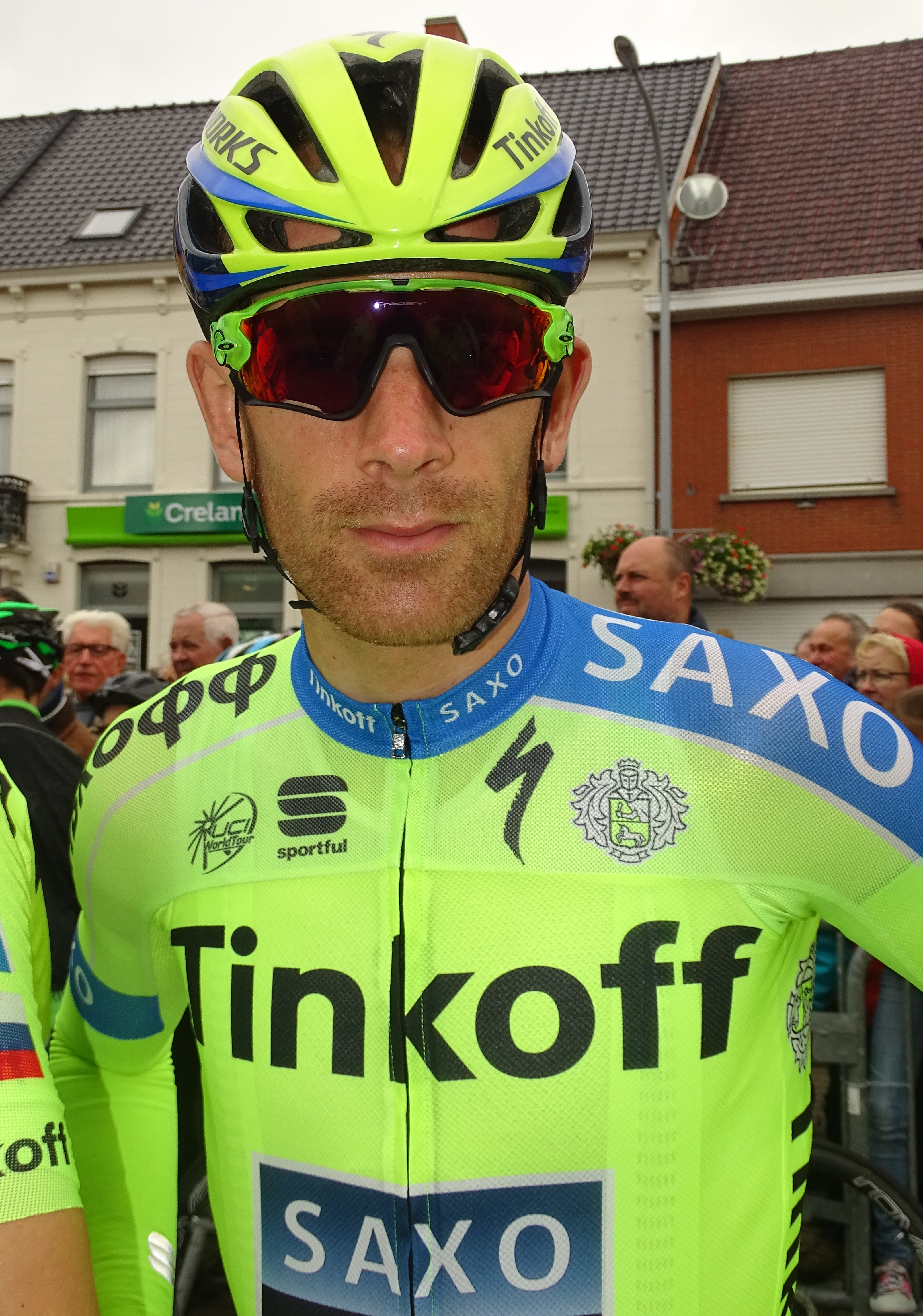 Reportage réalisé le vendredi 18 septembre à l'occasion de l'arrivée du Championnat des Flandres 2015 à Koolskamp (Ardooie), Belgique.